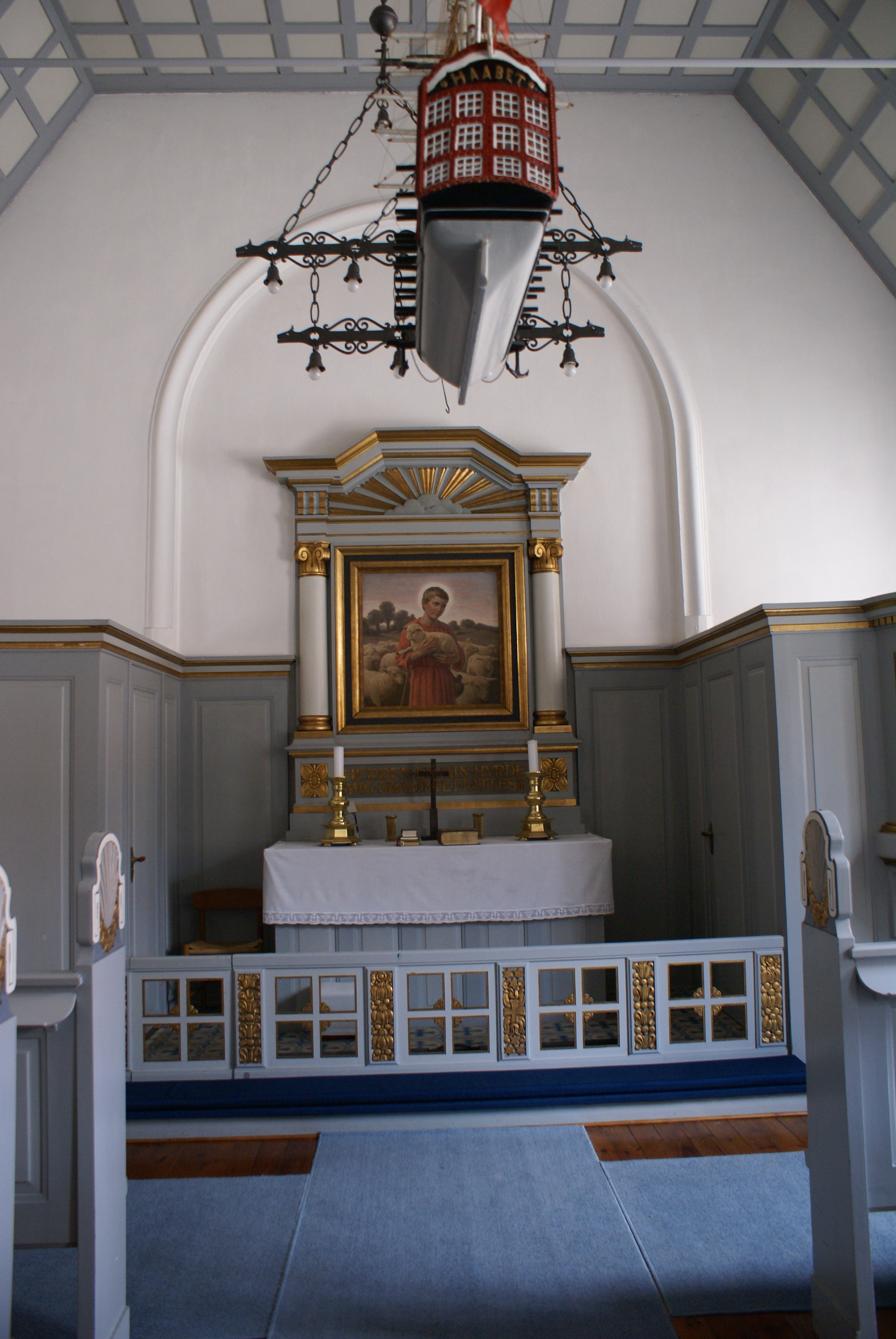 Altertavlen i kirken på Psykiatrihospitalet i Nykøbing Sj.